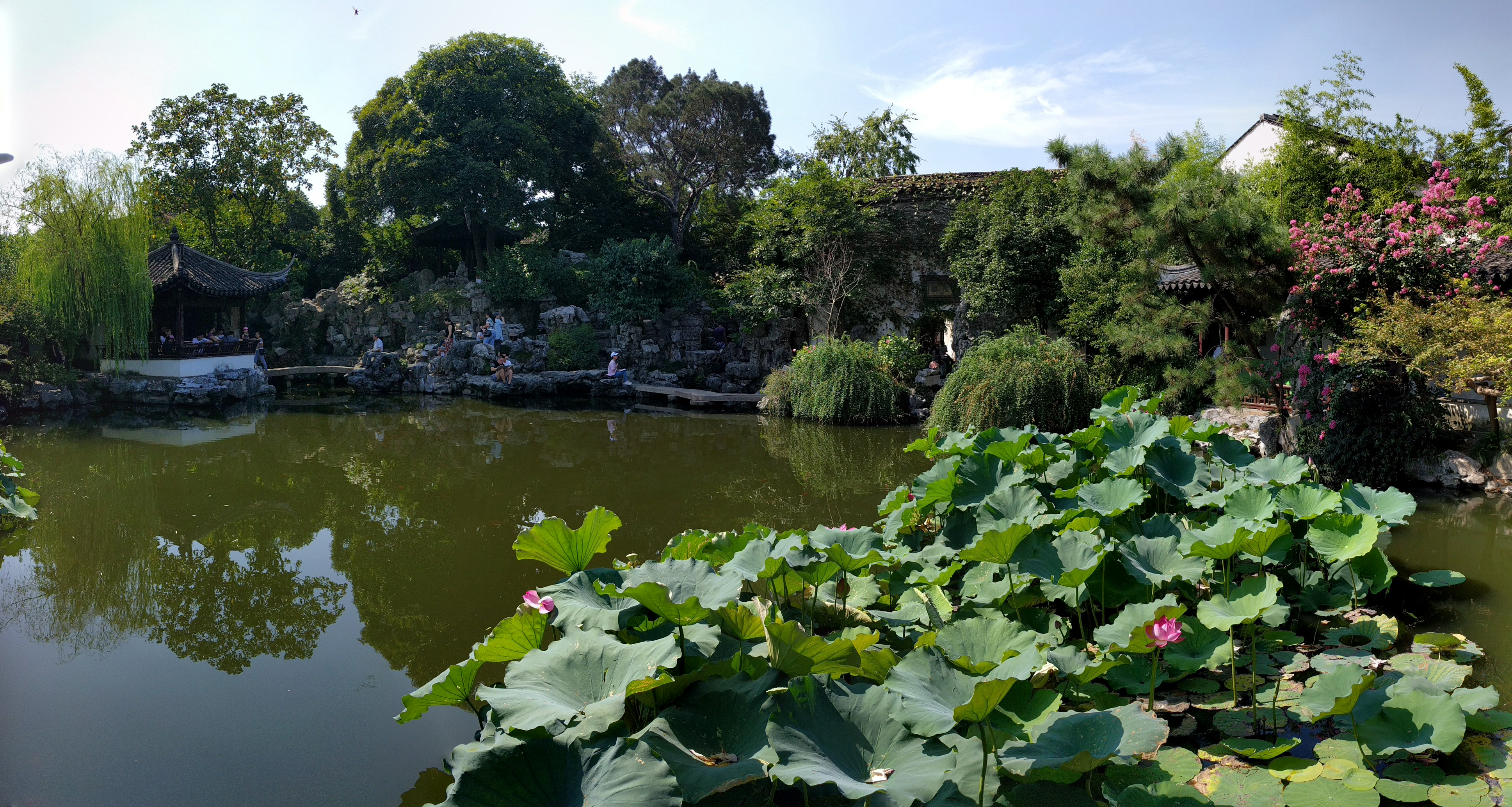 从延光阁看全景